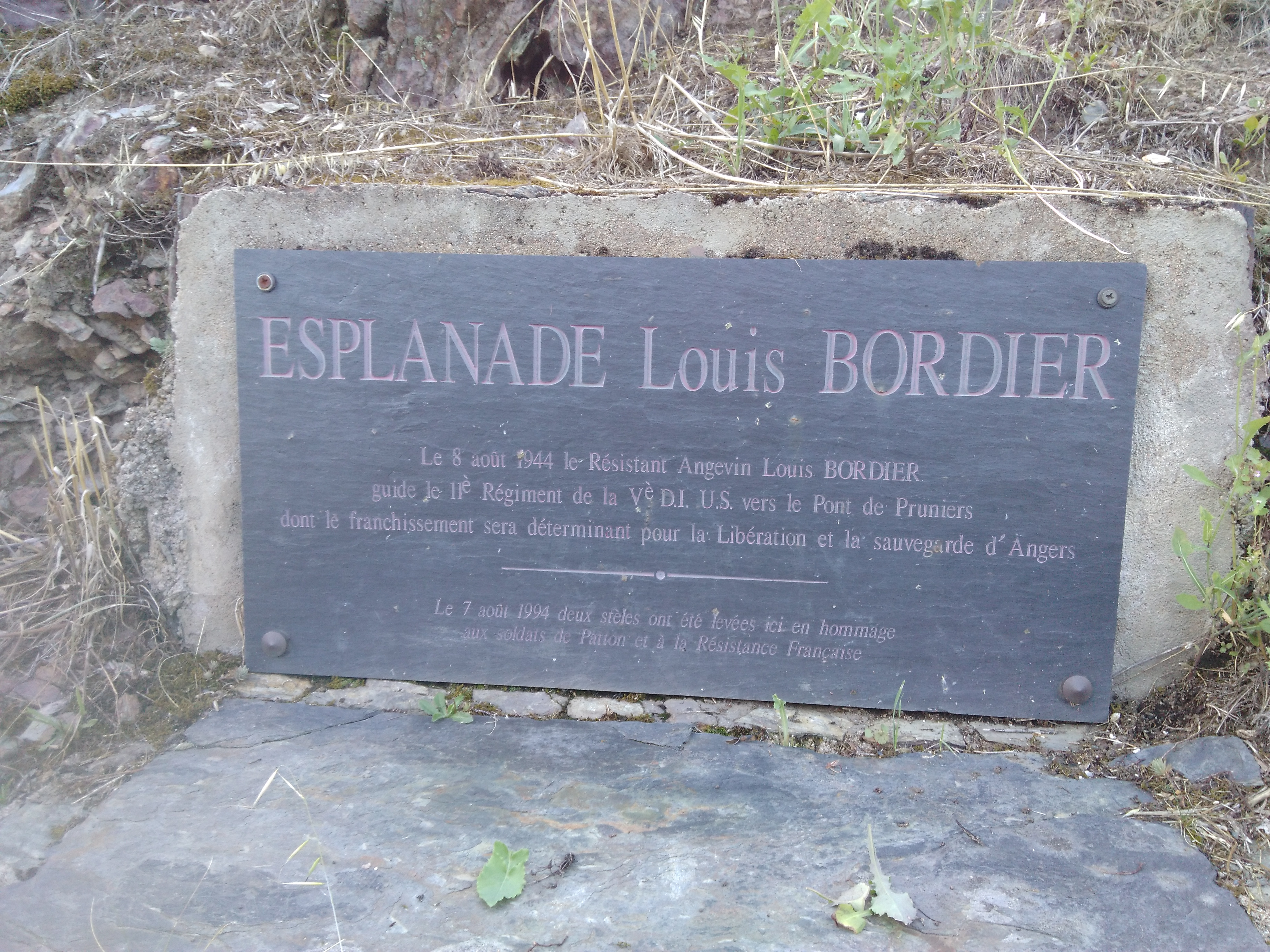 Inscription : ESPLANADE Louis BORDIER Le 8 août 1944 le Résistant Angevin Louis BORDIER guide le 11è Régiment de la Vè D.I. U.S. vers le Pont de Pruniers dont le franchissement sera déterminant pour la Libération et la sauvegarde d'Angers -*- Le 7 août 1994 deux stèles ont été levées ici en hommage aux soldats de Patton et à la Résistance Française